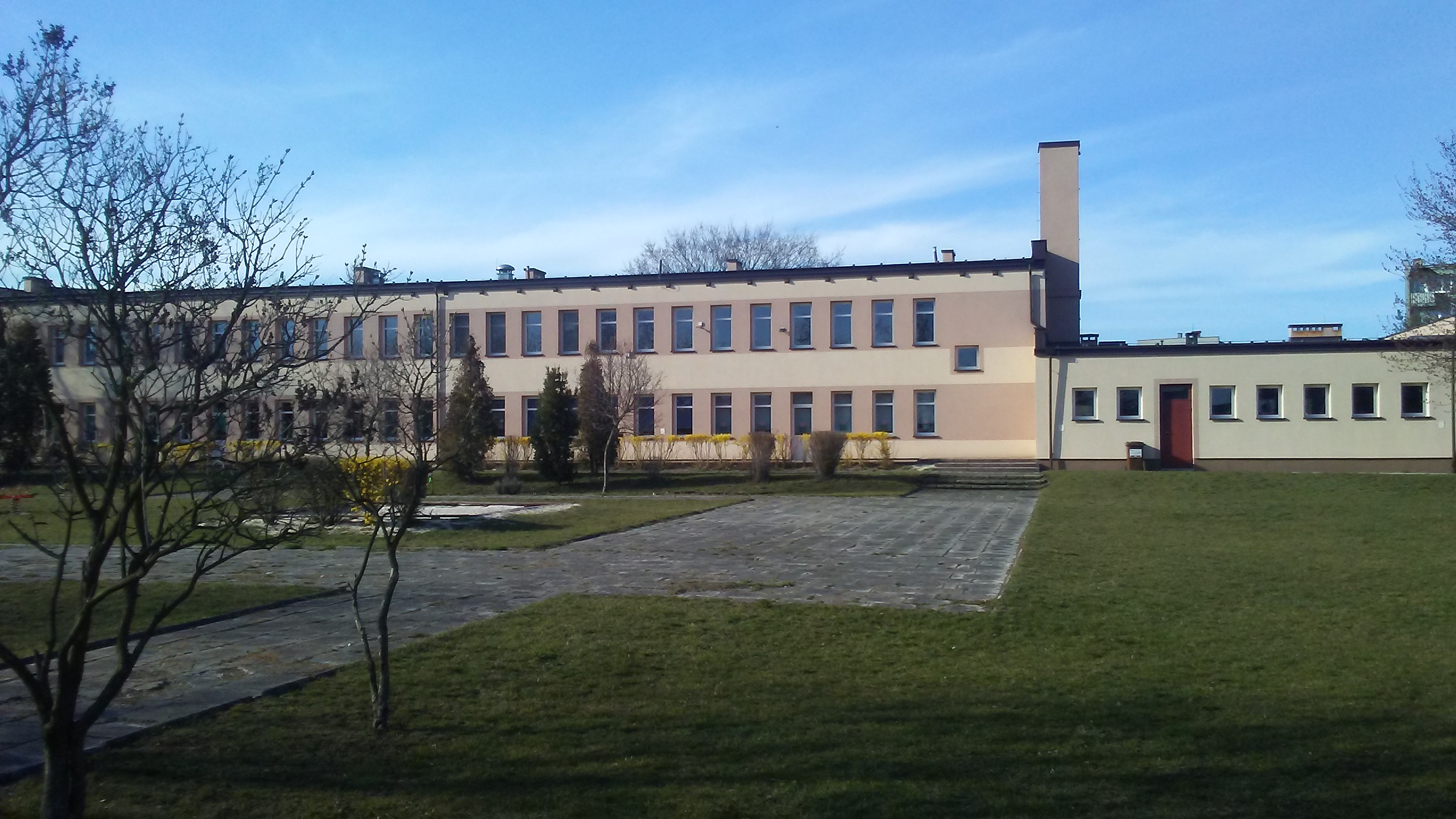 Przedszkole na Niebrowie w Tomaszowie Mazowieckim